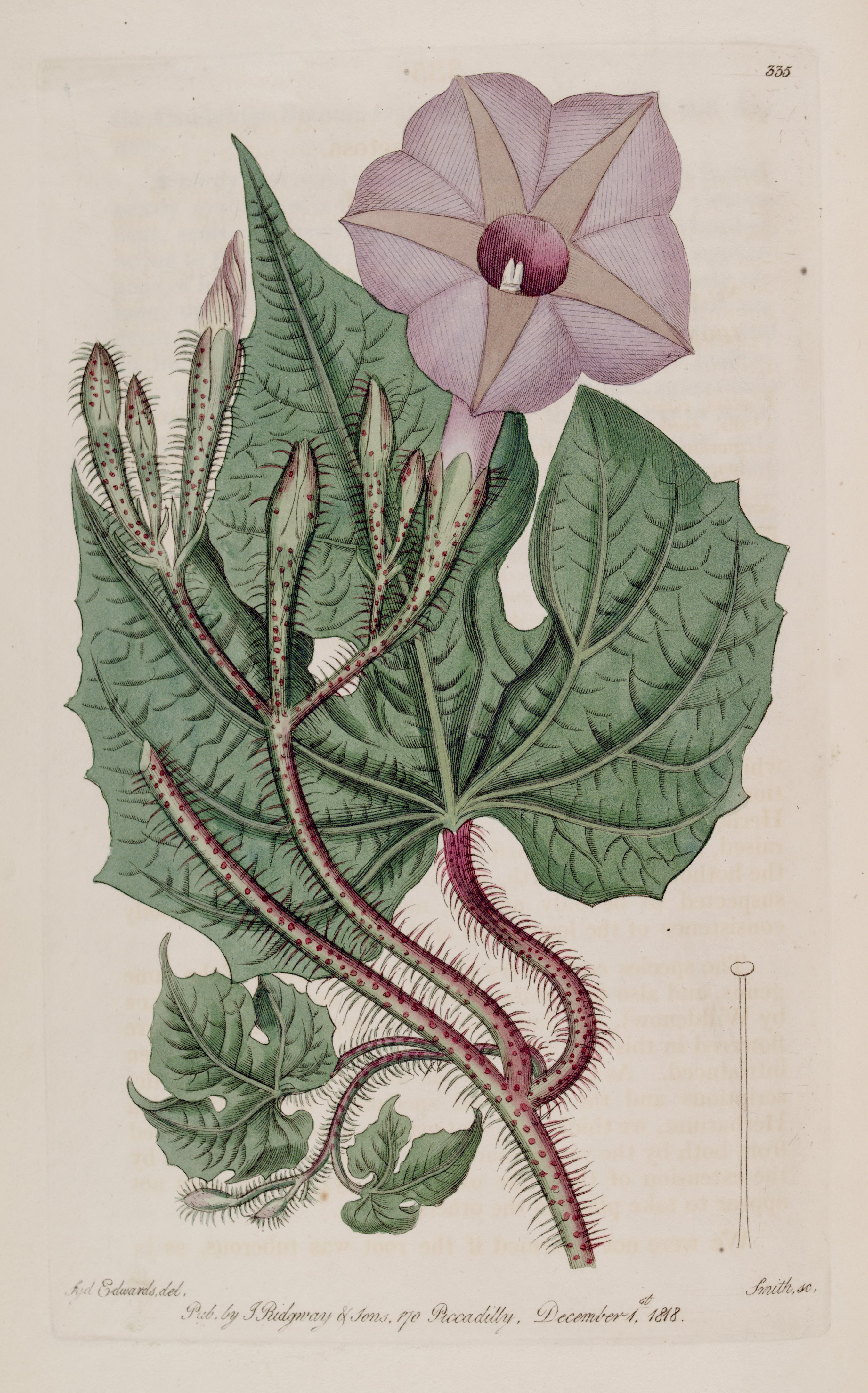 Ipomoea setosa